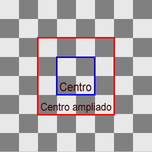 Concepto de centro en ajedrez.